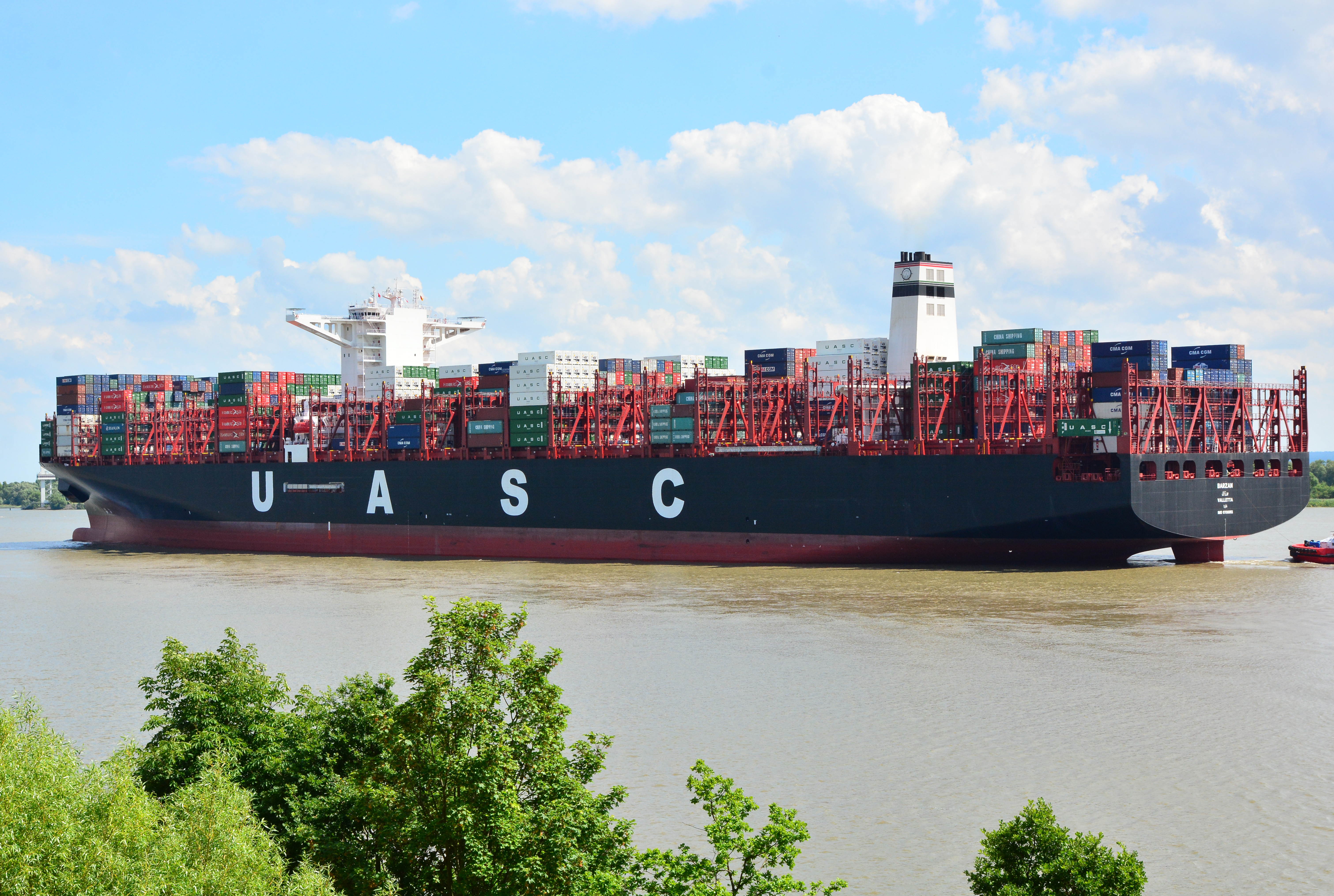 Das Containerschiff Barzan auf der Elbe bei Wedel.